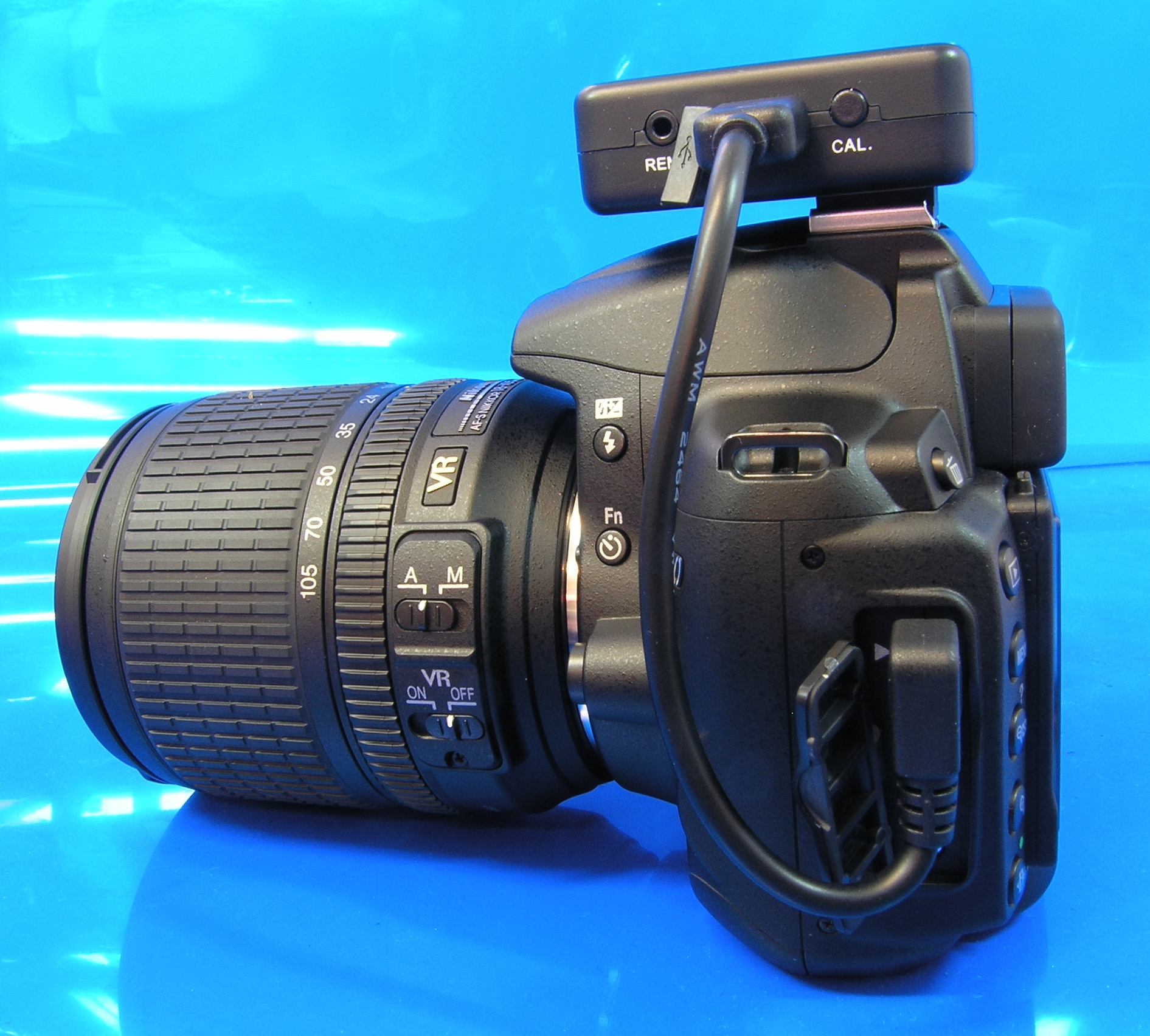 Solmeta Geotagger N2 Kompass, Foto-GPS für diverse GPS-fähige Nikon DSLR. Die Geo-Informationen werden direkt bei Aufnahme in die Bilddatei gespeichert.